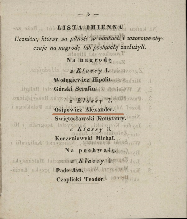 Strona z publikacji "Na akt uroczysty szkoły obwodowej w Suwałkach..." z 1837 r.